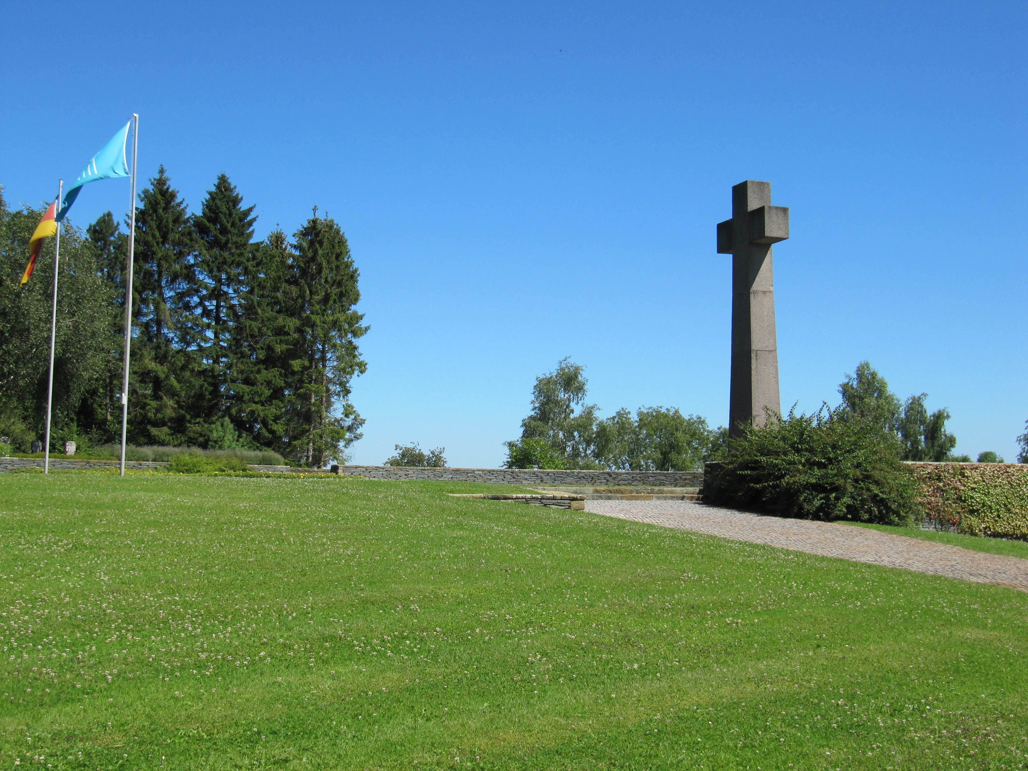 Nécropole de Noyers Pont Maugis en Ardennes, France